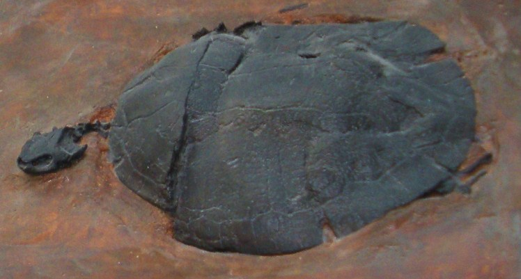 Fossil of Allaeochelys, an extinct turtle Took the photo at Musee d'Histoire Naturelle, Brussels